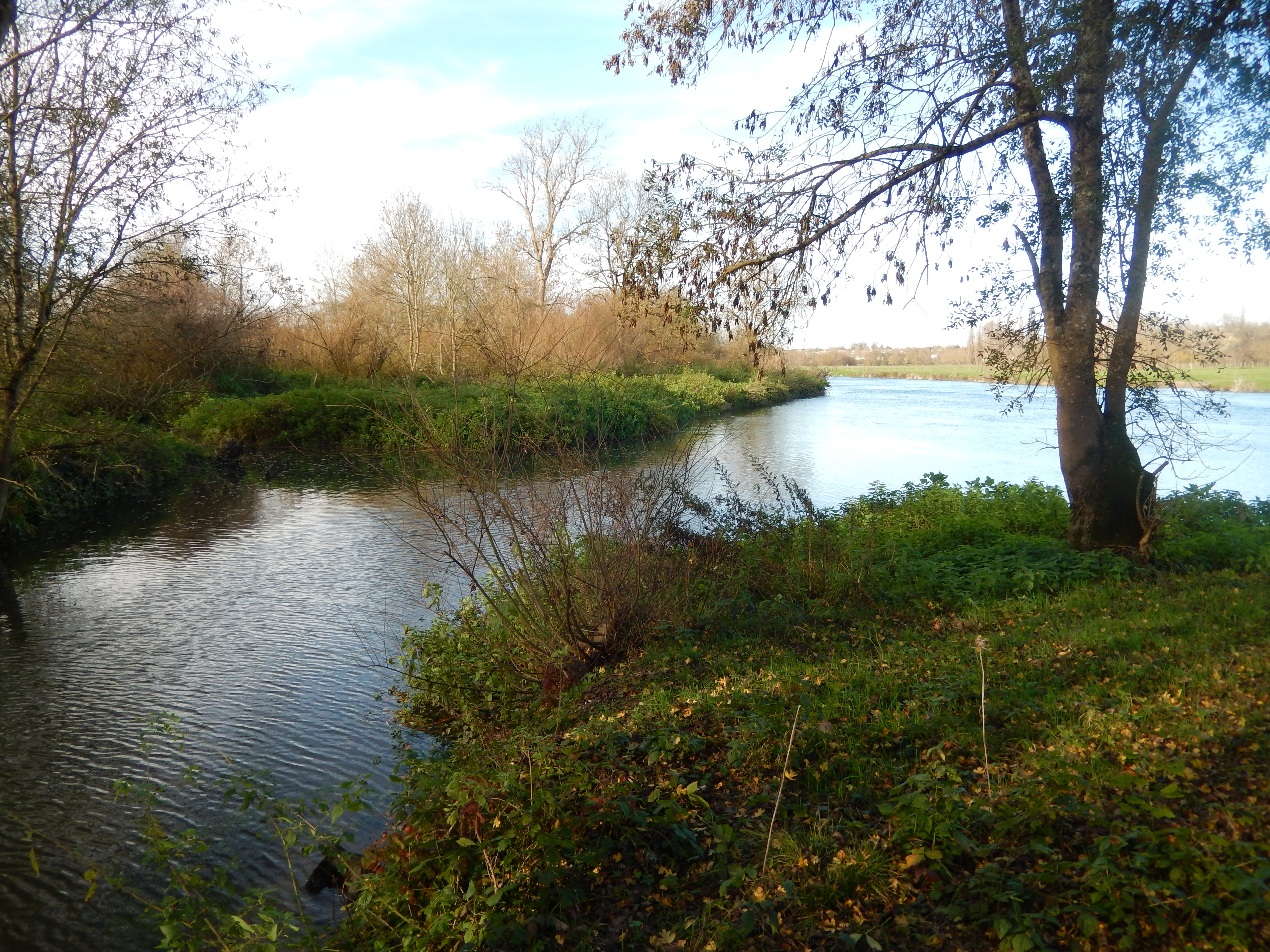 (Communes de Courcoury et Saint-Sever-de-Saintonge et Chaniers, Charente-Maritime, France.) Le point de confluence du bras oriental de la rivière Seugne (au premier plan à gauche) avec le fleuve Charente (à droite). La photo a été prise depuis l'extrémité ouest de la commune de Saint-Sever-de-Saintonge. On aperçoit, à gauche, des terres dépendant de la commune de Courcoury ; et, à l'arrière-plan à droite, au-delà de la Charente, des terres dépendant de la commune de Chaniers.